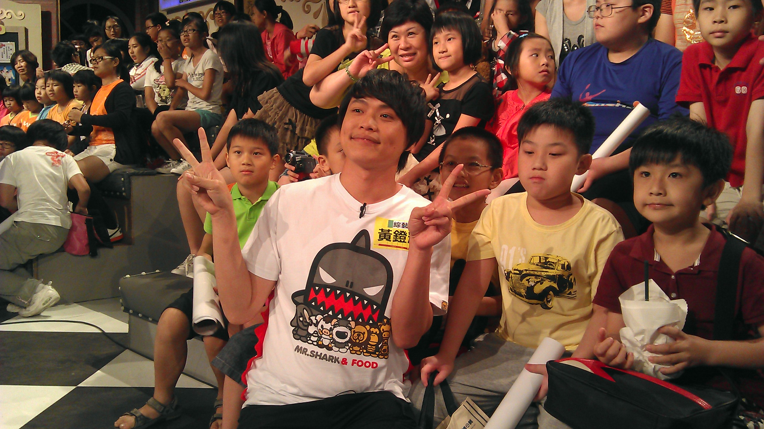 演過電影《艋舺》的藝人黃鐙輝。